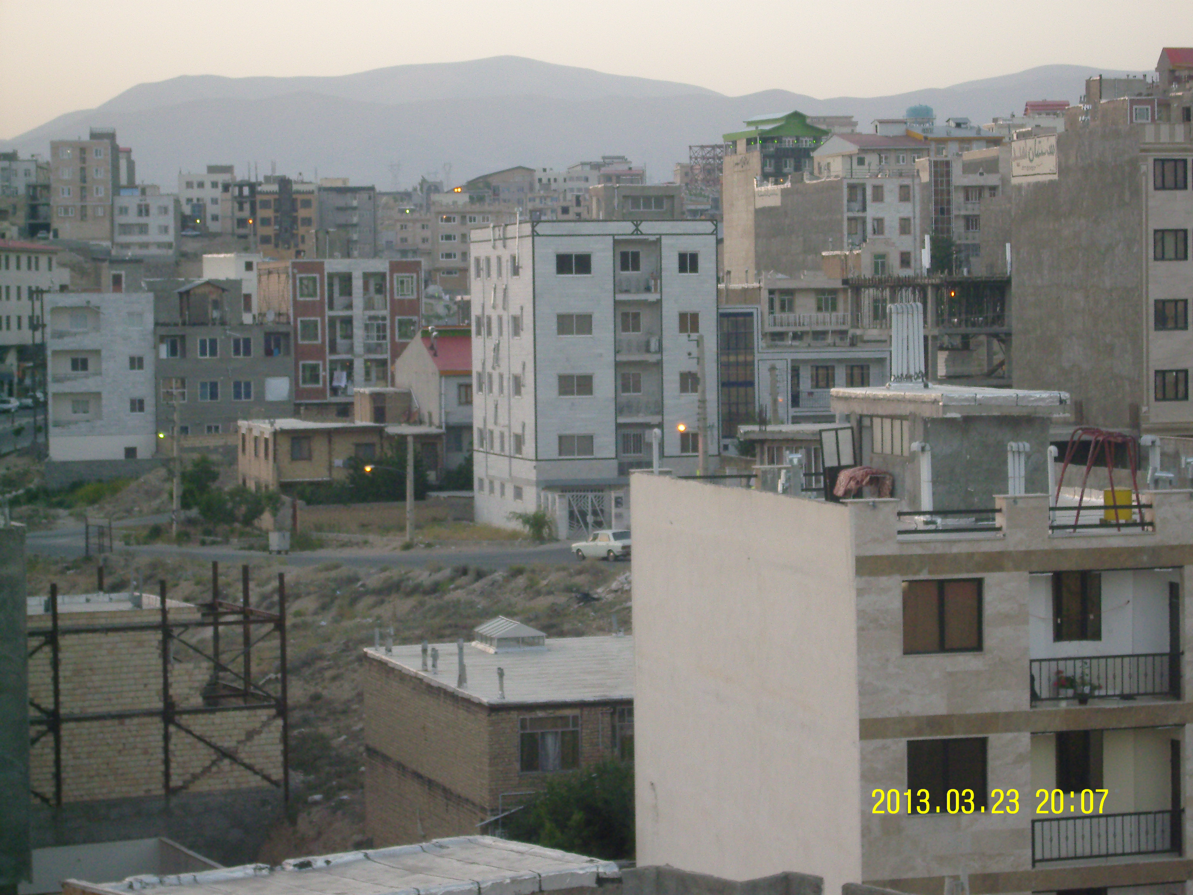 نمائی از شهرک کوهسار فیروزکوه از پنجرۀ اطاق محلّ سکونتم در فیروزکوه